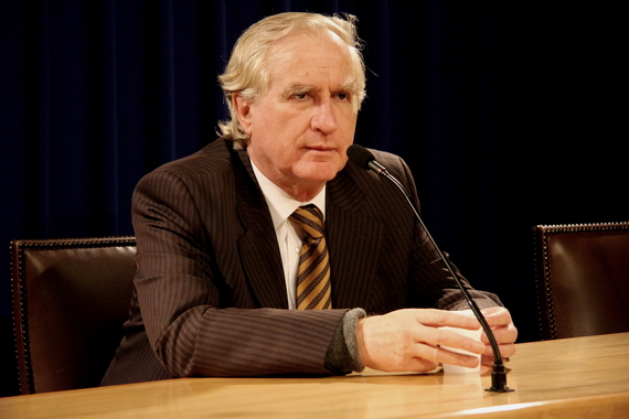 16-07-2009. Senador Adolfo Zaldívar Larraín.